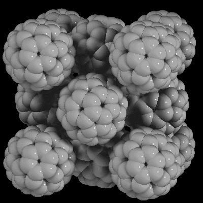 Структура фуллерита.